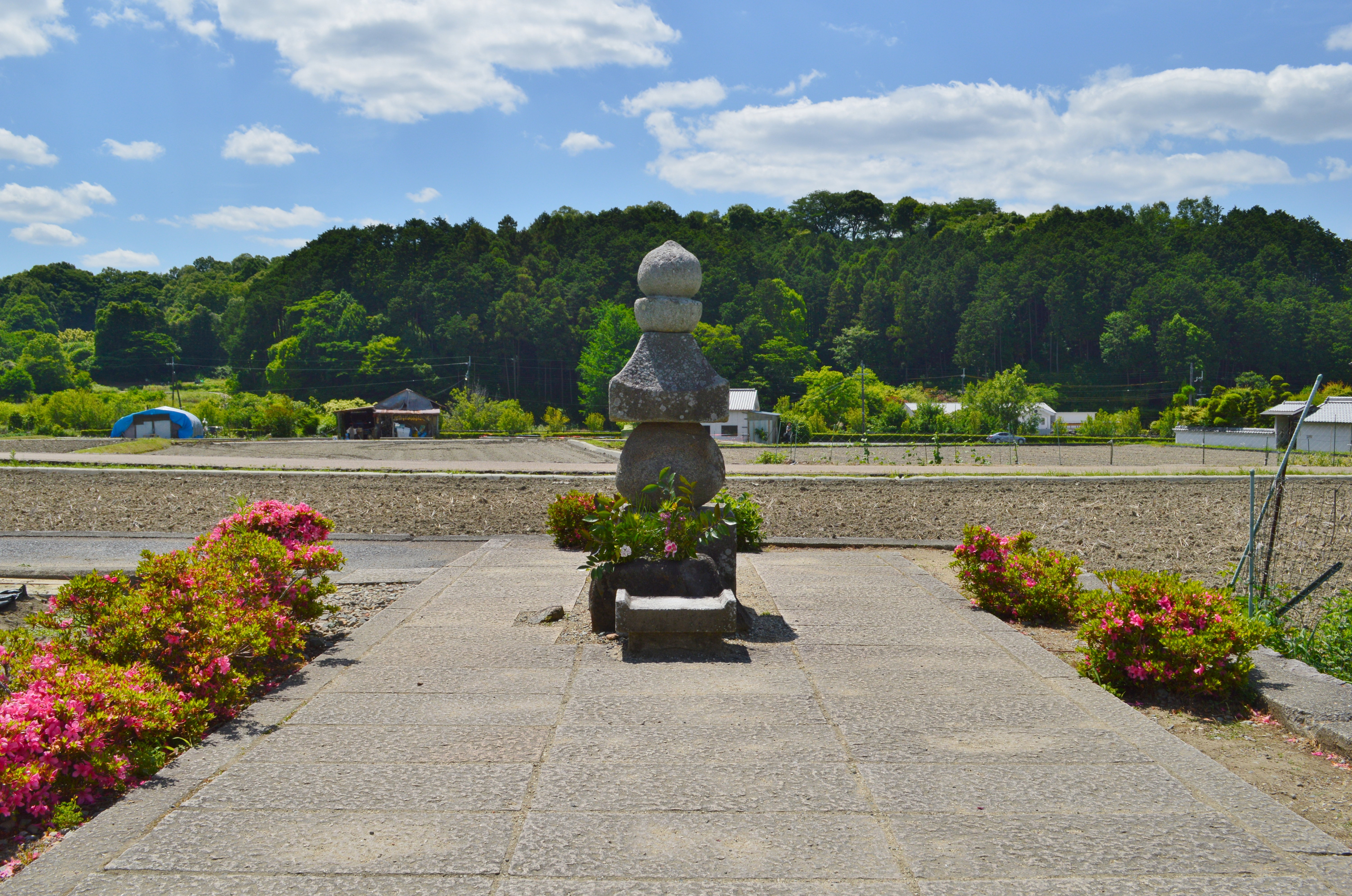 伝蘇我入鹿首塚